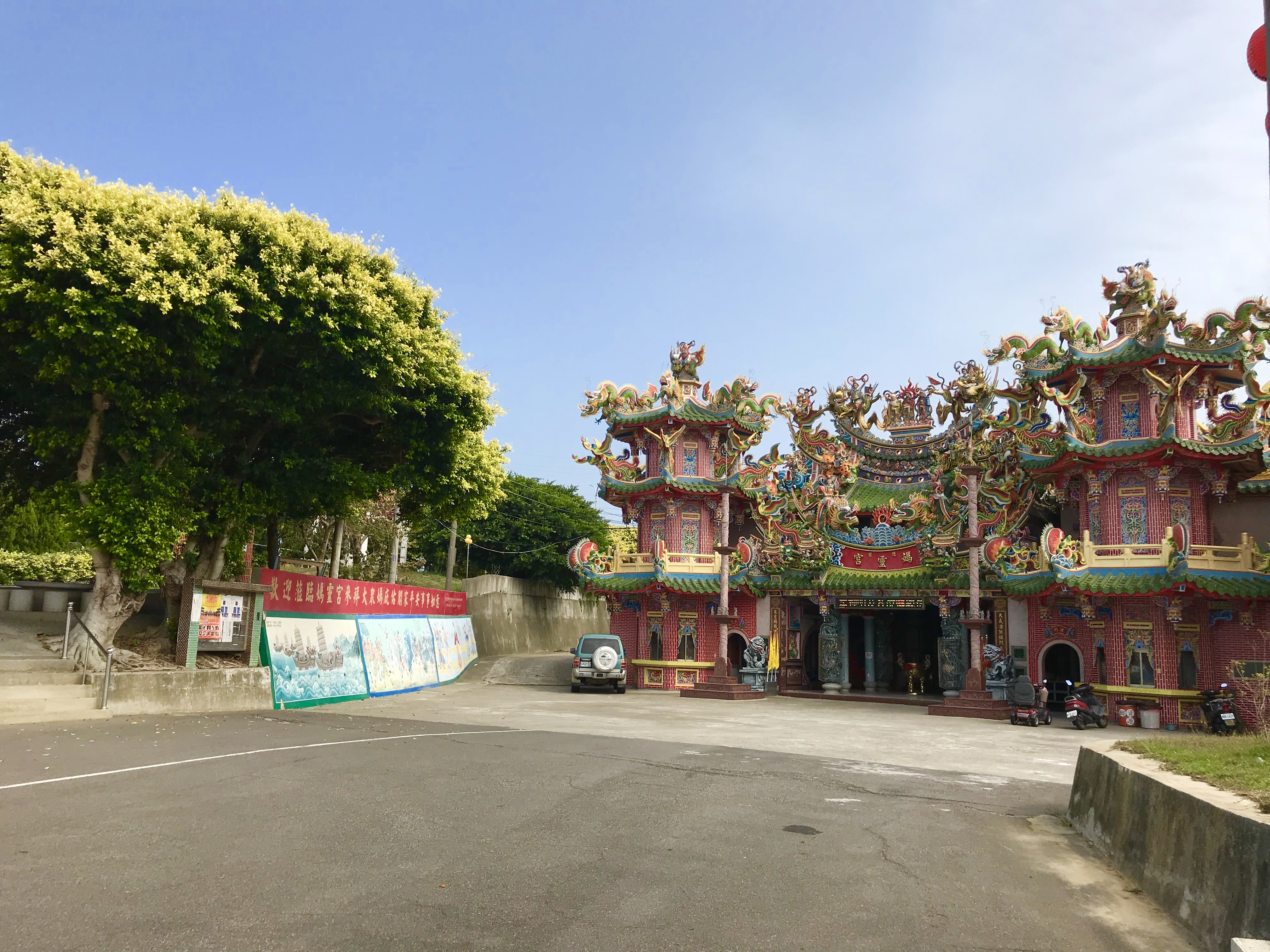 中文（台灣）: 媽靈宮一景